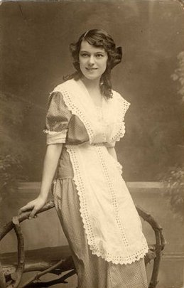 Gárdonyi Géza: Annuska. Nemzeti Színház. Bemutató: 1915-05-02. Rendező: Csathó Kálmán. Szereplők: Annuska: Bajor Gizi